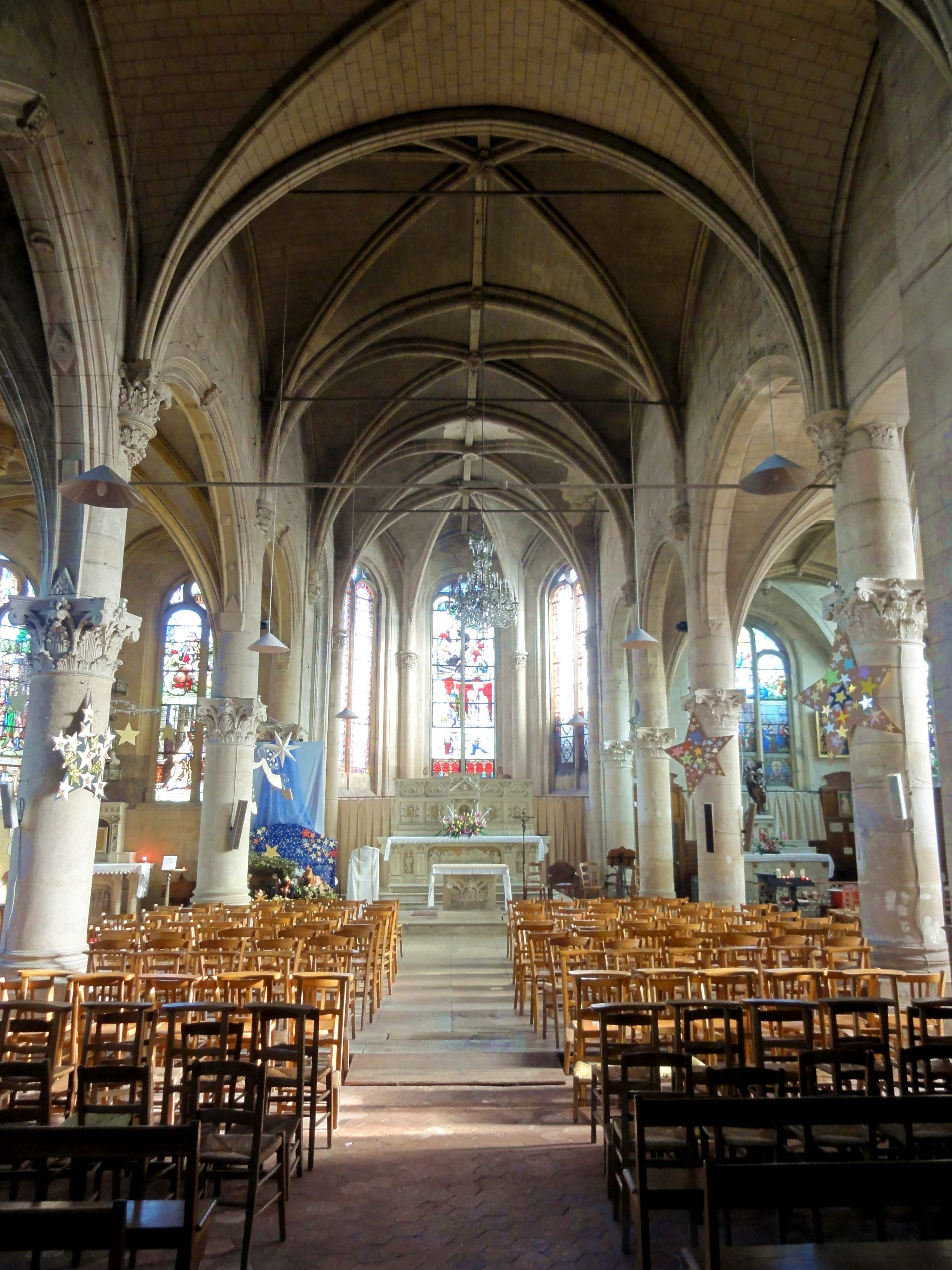 Chœur.